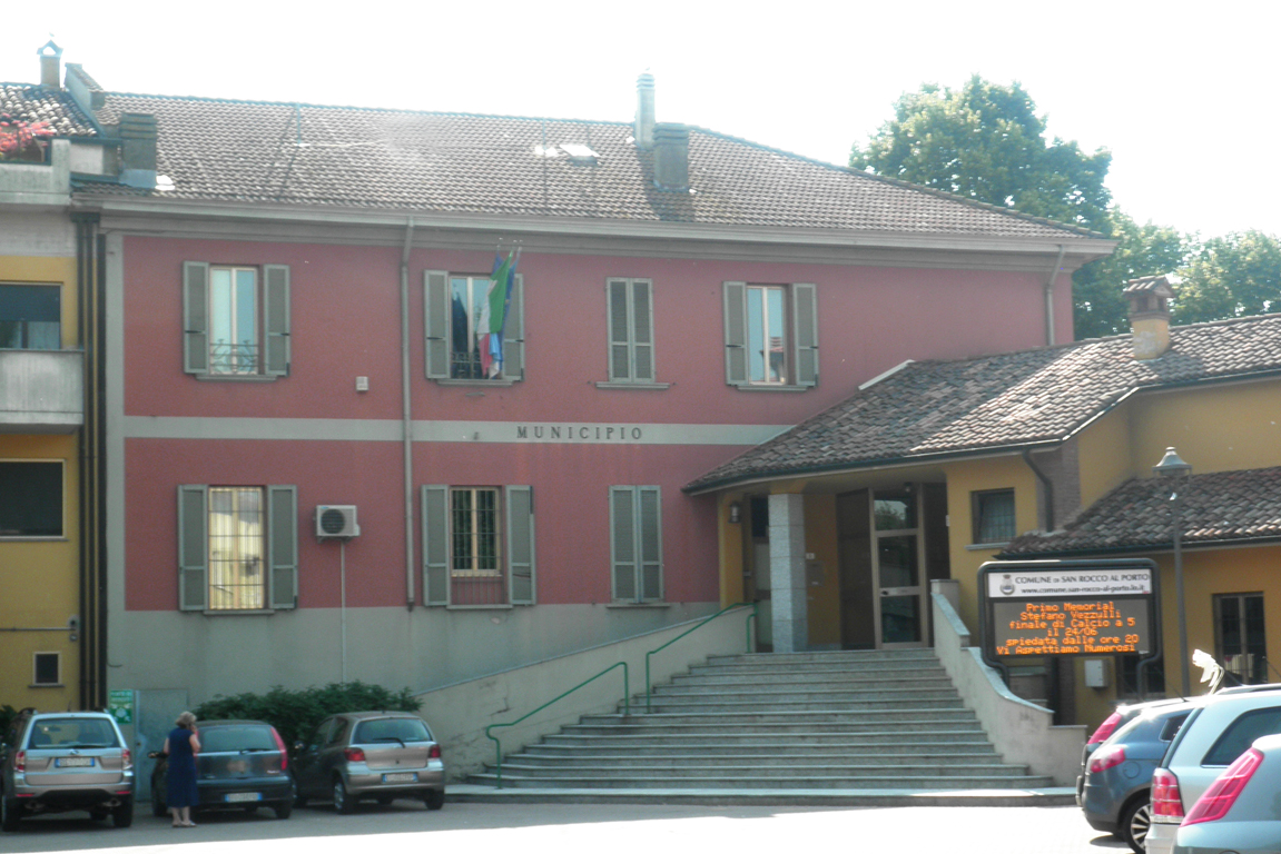 Municipio di San Rocco al Porto